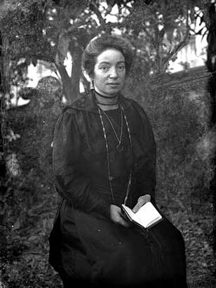 Maria Pezzè Pascolato, pedagogista, scrittrice, insegnante (1869-1933)